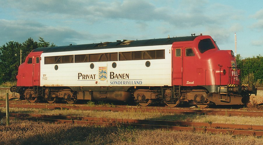 PBS MY 1122 at Tønder, Denmark